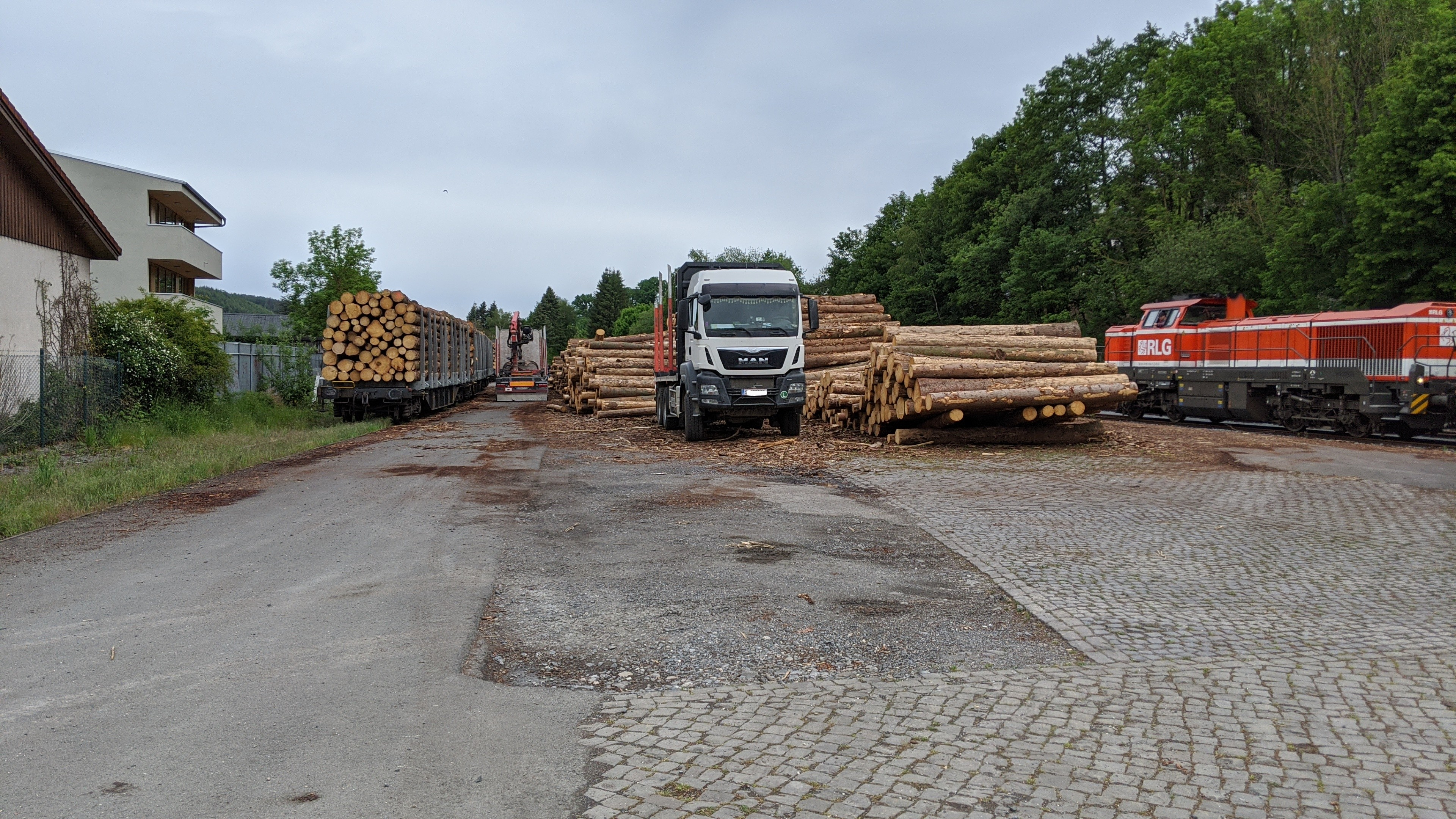 Güterlok der WLE auf dem Weg zum Lokschuppen nach Neheim Hüsten Bf. Leerfahrt nach umfangreichen Rangierarbeiten am Bf Sundern.